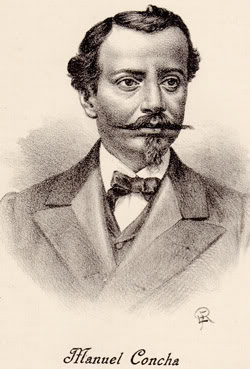 Manuel Concha Gajardo